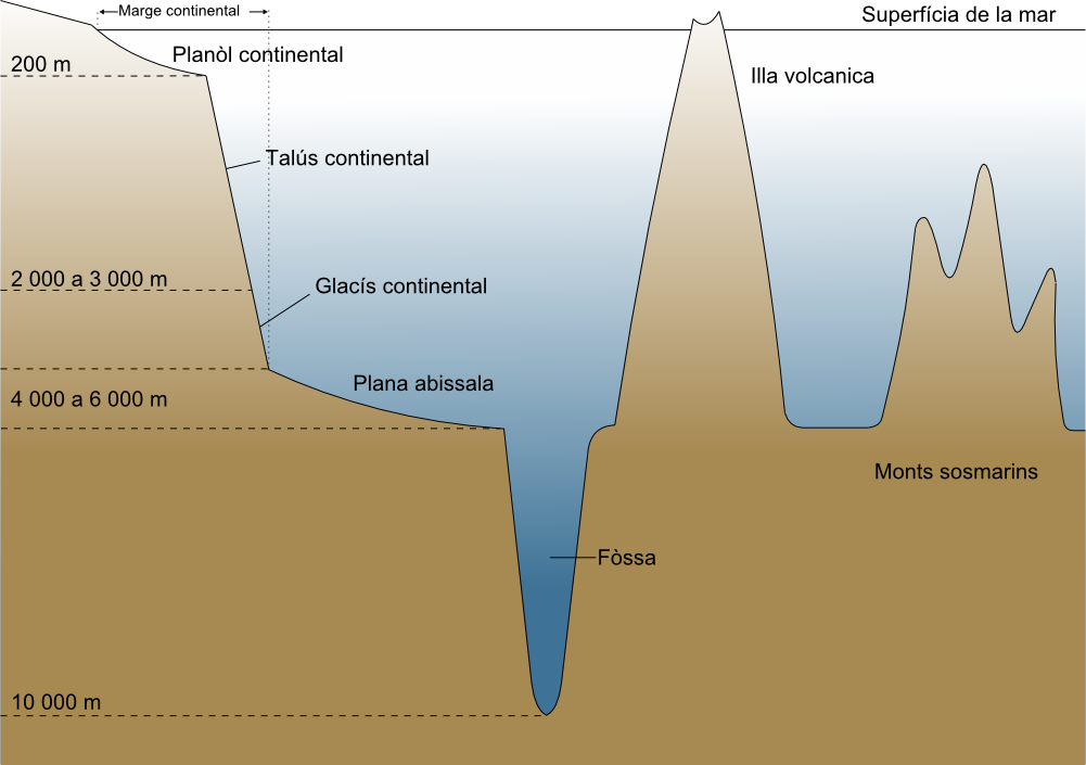 Esquèma representant un bacin oceanic comportant qualques caracteristicas